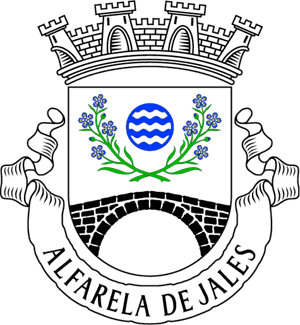 Brasão da freguesia de Alfarela de Jales (concelho de Vila Pouca de Aguiar)